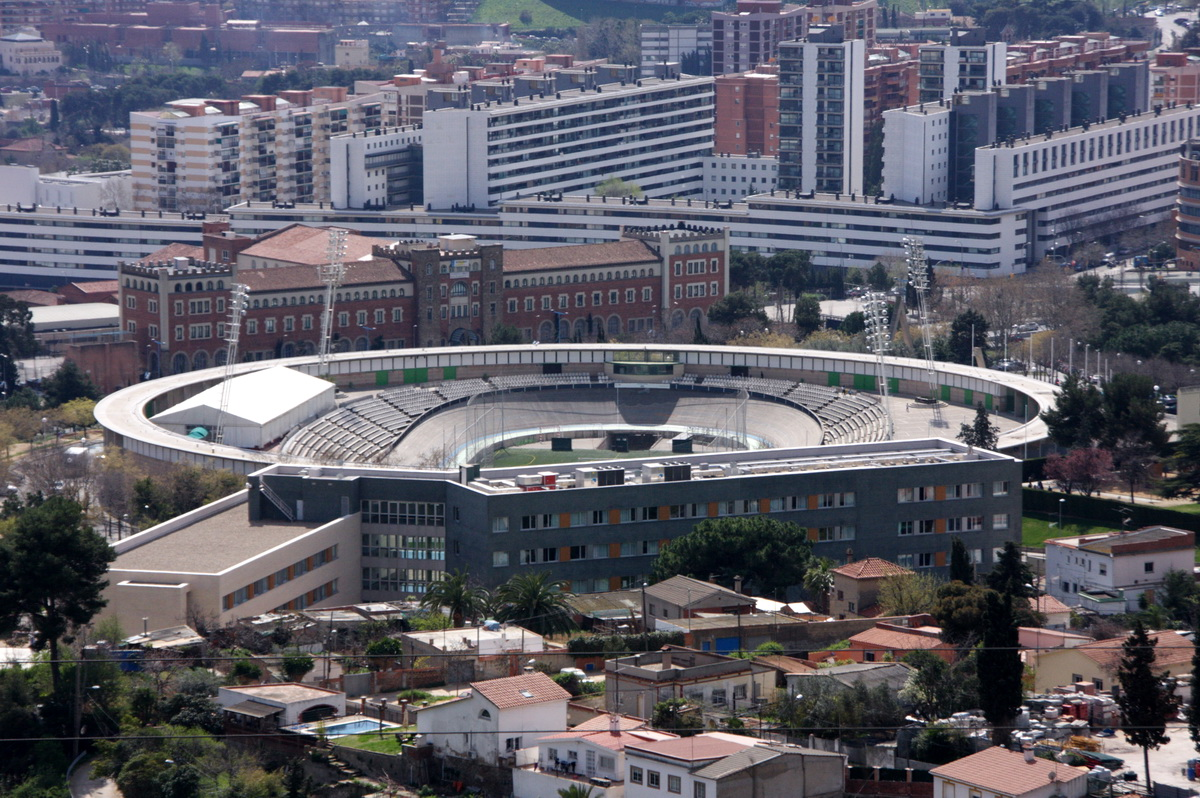 Velòdrom d'Horta, a la Vall d'Hebró de Barcelona (Catalunya)